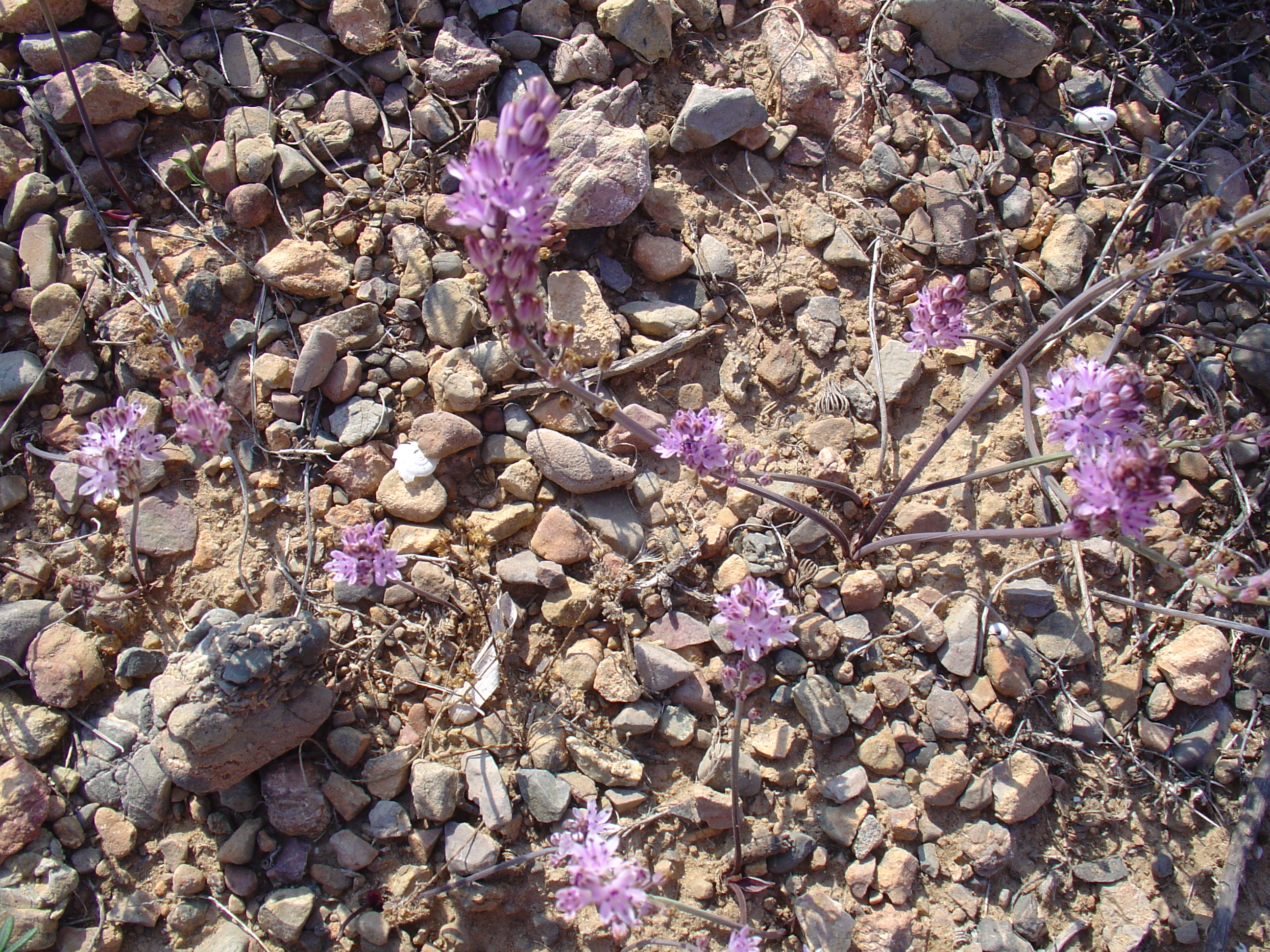 Prospero obtusifolium (Scilla obtusifolia), Asparagaceae, from Cabo de Palos, Murcia, Spain